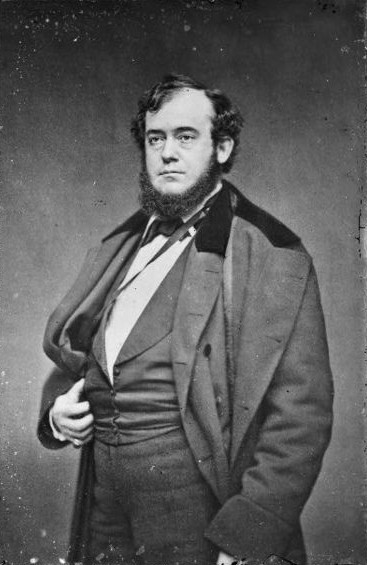 Isaac V. Fowler